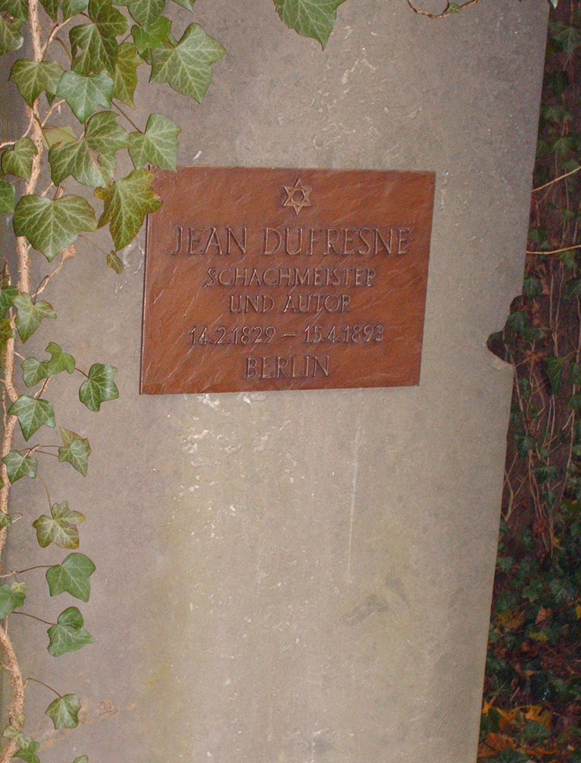 Am 20. Oktober 2006 enthüllte Bronzetafel am 2002 wiederentdeckten Grab von Jean Dufresne